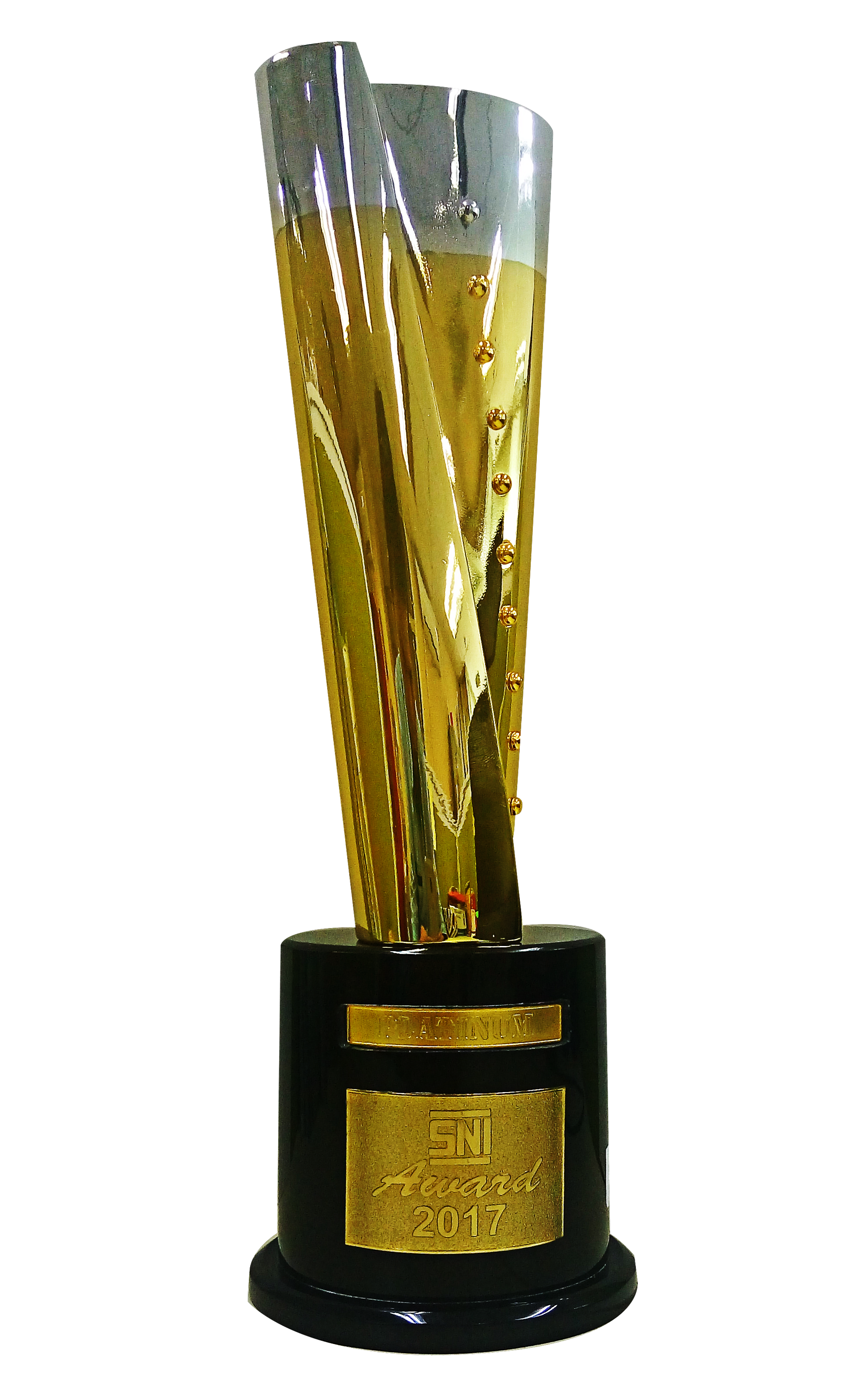 Desain Piala SNI Award